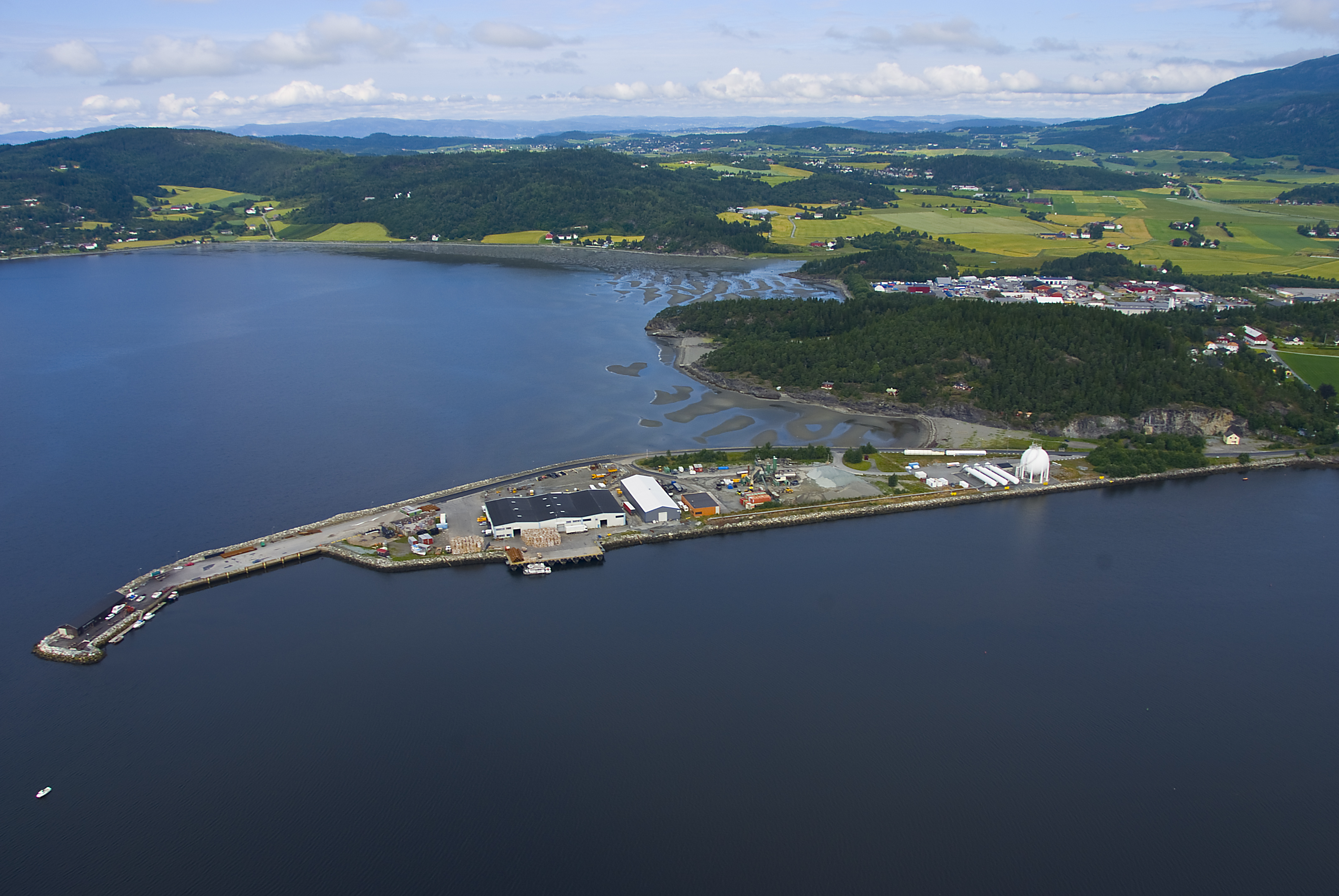 Foto: Trondheim Havn/Åge Hojem